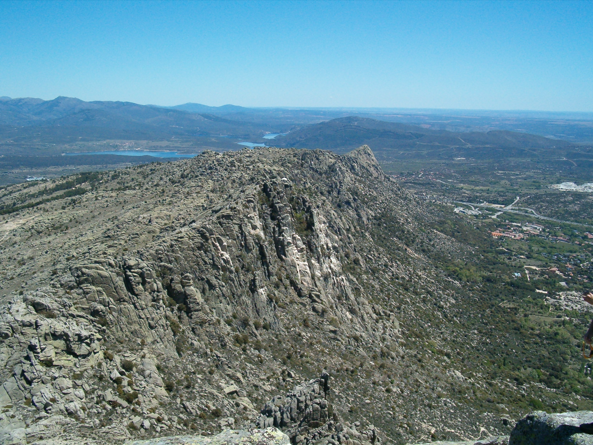 La foto muestra la sierra de la Cabrera desde el punto más alto de la misma (Cancho Gordo 1564msnm). Al fondo se aprecia el Cancho del Aguila y el embalse del Atazar